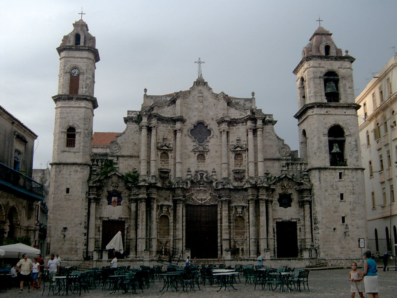 Cattedrale dell'Havana, Cuba